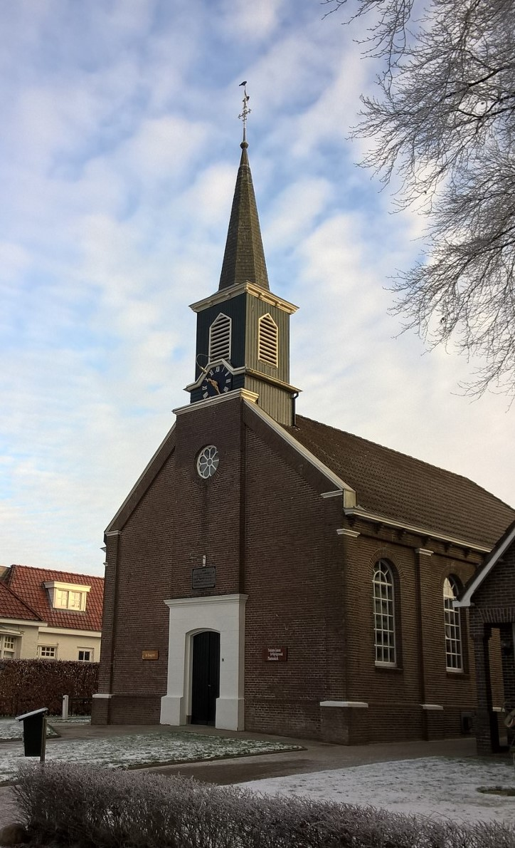 De Plantsoenkerk uit 1868 in De Wilp (Groningen).